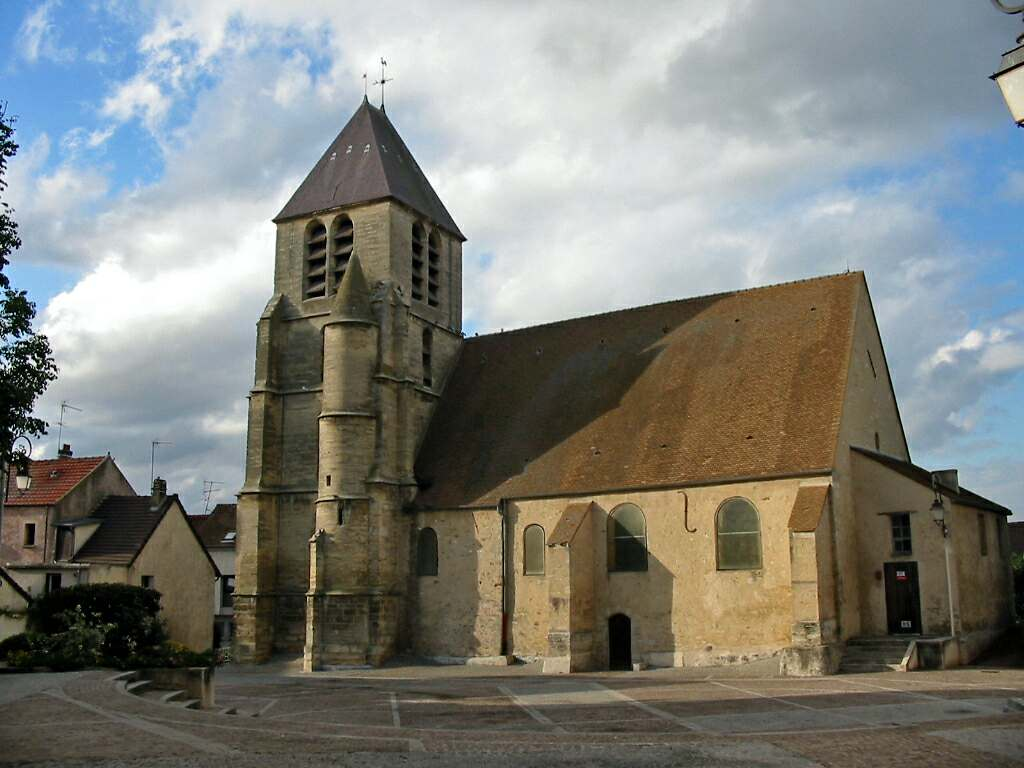 Aubergenville (Yvelines) église Saint-Ouen Photo JH Mora, octobre 2005